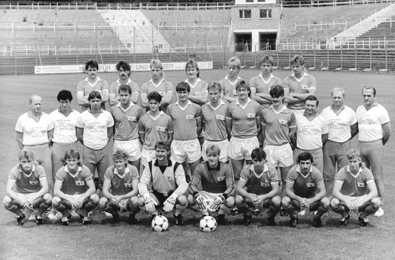 ADN-ZB-Roeske-3.8.88-ma-Berlin: 1. FC Union Berlin. Die Fußball-Mannschaft für die DDR-Oberligasaison 1988-89: Hintere Reihe v.l.n.r.: Peter Schoknecht, Olaf Reinbold, Olaf Seier, Norbert Trieloff, Rene Adamczewski, Steffen Enge und Rene Unglaube. Mittlere Reihe v.l.n.r.: Trainer Manfred Staender, Trainer Harry Schröter, Trainer Karsten Heine, Dirk Koenen, Michael Weinrich, Frank Plazcek, Andreas Nagel, Mario Mack, Matthias Morack, Masseur Günther Steinicke, Mannschaftsleiter Herbert Domschke, Mannschaftsarzt Dr. med. Günter Hensch. Vordere Reihe v.l.n.r.: Andre Sirocks, Volker Probst, Olaf Zimmermann, torhüter Steffen Schlegel, Torhüter Detlef Hartmann, Bernd Jopek, Lutz Hendel und Olaf Hirsch.